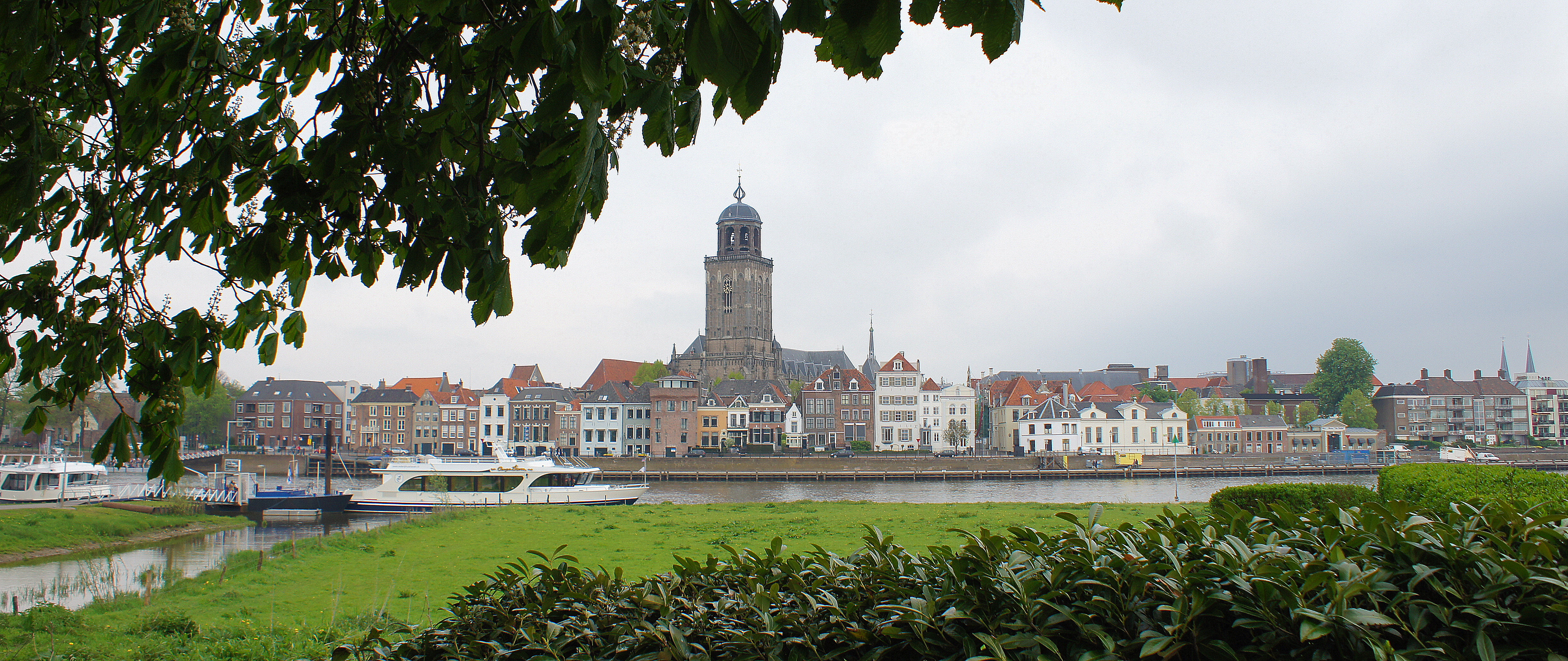 Zicht op Deventer over de IJssel met de Lebuinuskerk